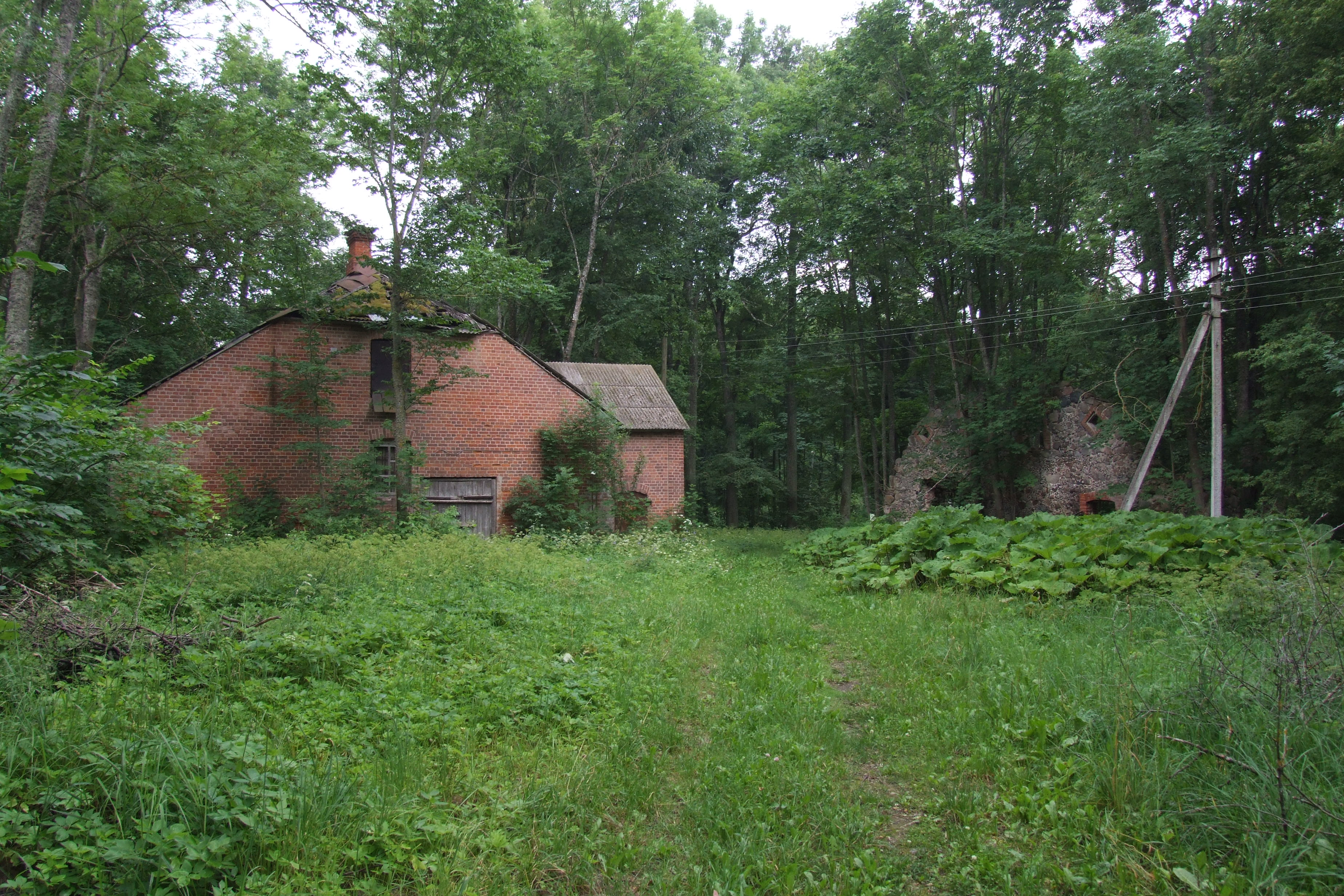 Ruskulovas muižas kompleksā, 09.07.2011.